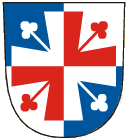 znak obce